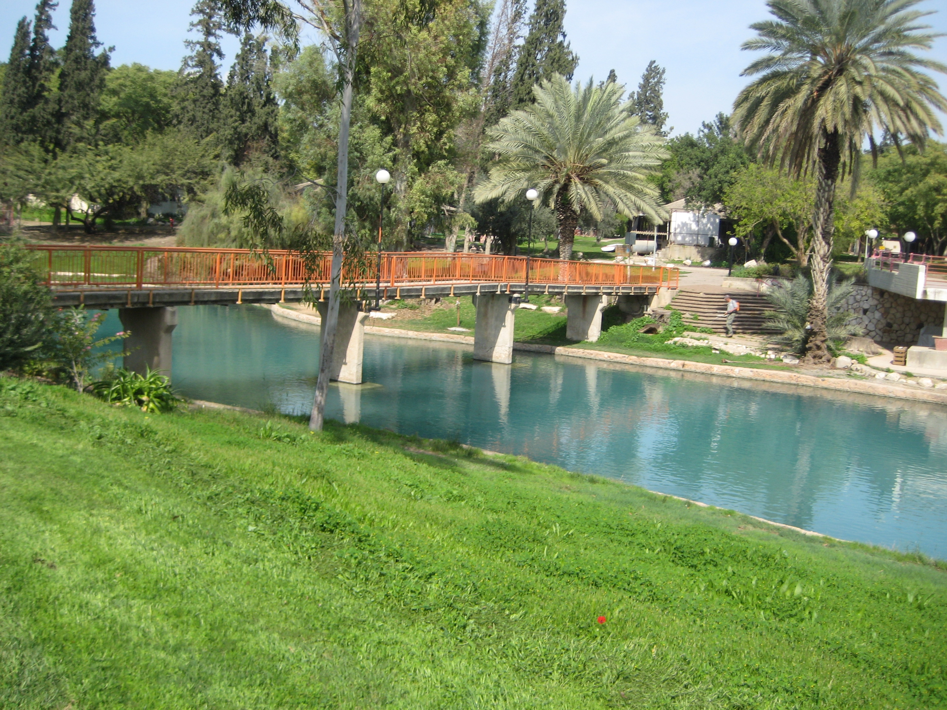 מראה בתוך הקיבוץ, 2011